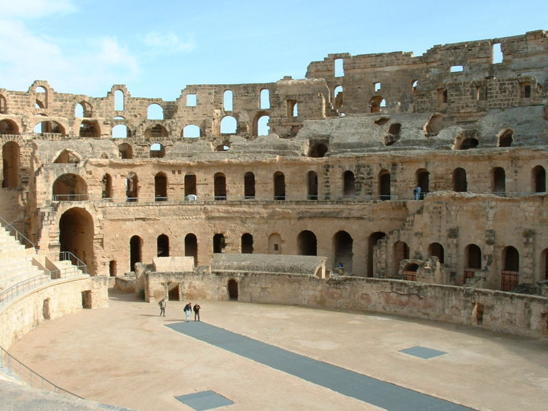 Photographie personnelle prise à El Jem (Tunisie). Vue de l'amphithéâtre